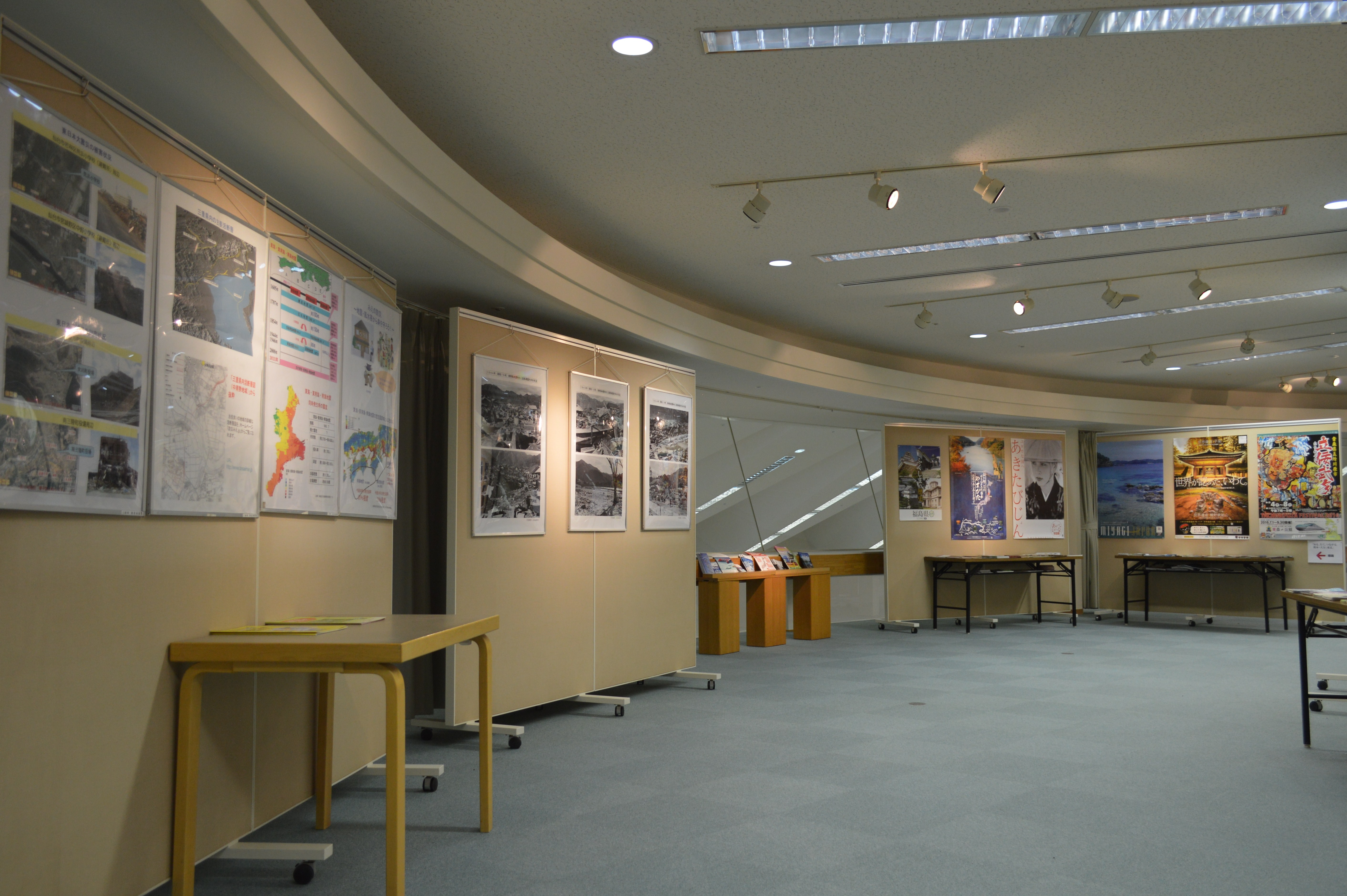 三重県立図書館。2階の文学コーナー。